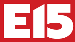 Současné logo deníku E15.